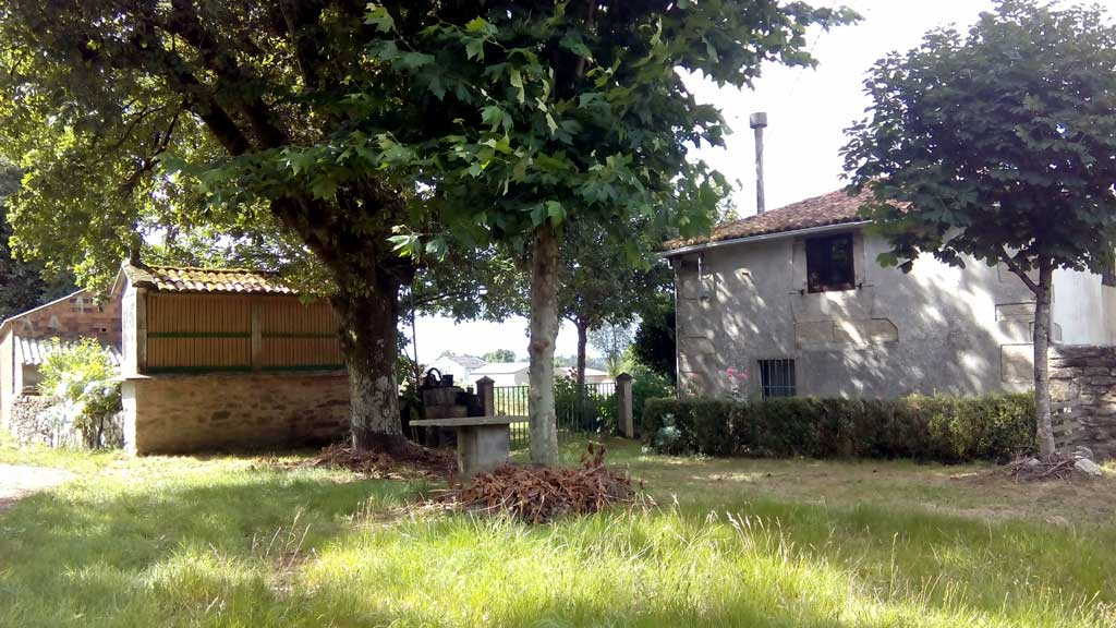 Vista de Samel, Curtis.